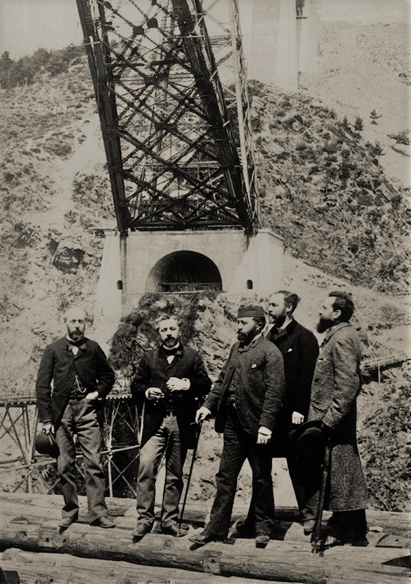 L'ingénieur Gustave Eiffel et ses collaborateurs dont Léon Boyer et Henri Louis Duret au pied du Viaduc de Garabit